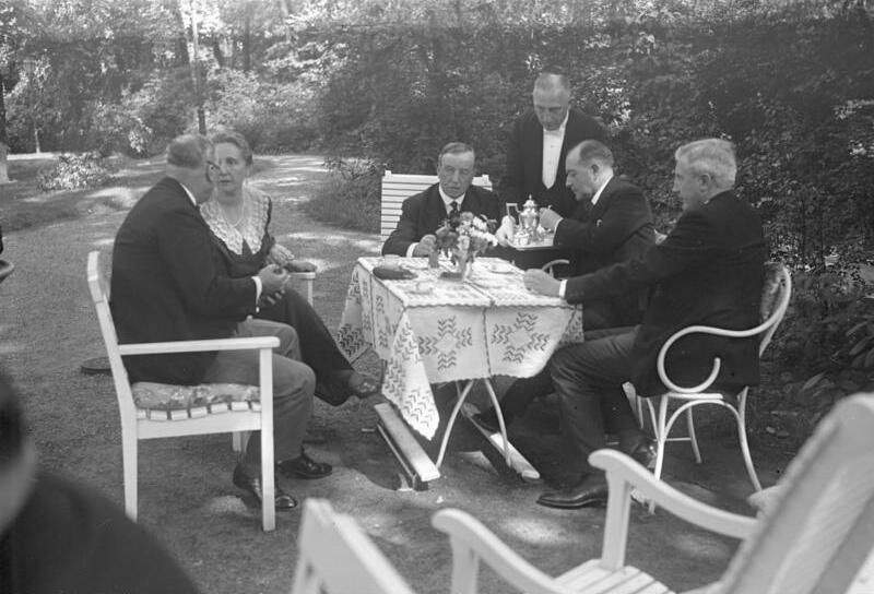 Die grossen politischen Empfänge in der Reichshauptstadt! Reichsaussenminister Dr. Curtius gibt zu Ehren des englischen Aussenministers Henderson einen Tee im Garten des Auswärtigen Amtes. Der englische Aussenminister Henderson (Mitte) im eifrigen Gespräch mit dem deutschen Reichsaussenminister Dr. Curtius. Von links nach rechts: der englische Botschafter in Berlin Sir Horace Rumboldt, Frau Dr. Curtius, der englische Aussenminister Henderson, Reichsaussenminister Dr. Curtius, der deutsche Staatssekretär von Bülow im Garten des Auswärtigen Amtes. Information added by Wikimedia users.This is not Bismarck's cabinet member Bernhard von Bülow, but a nephew, Bernhard Wilhelm von Bülow.